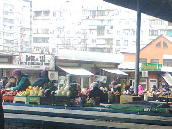 Центральный рынок. Мариуполь.